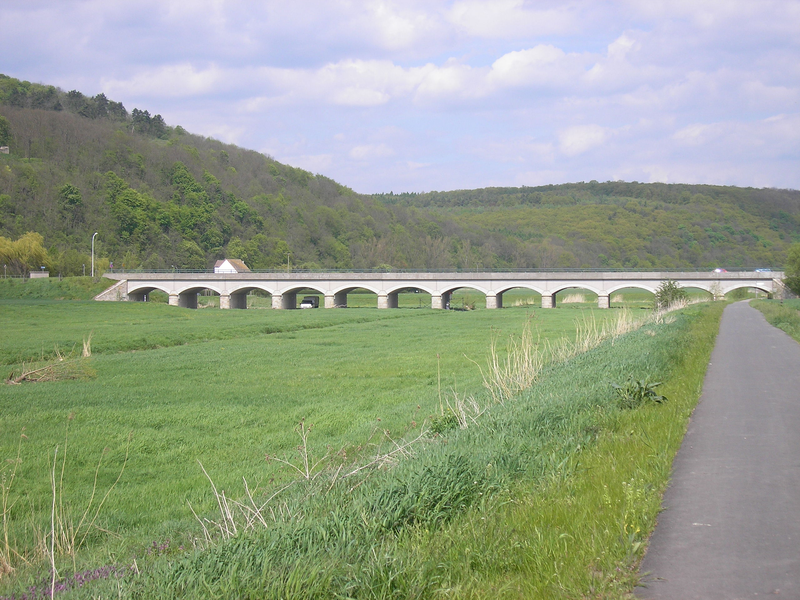 Die Unstrutflutbrücke bei Sachsenburg (Thüringen).